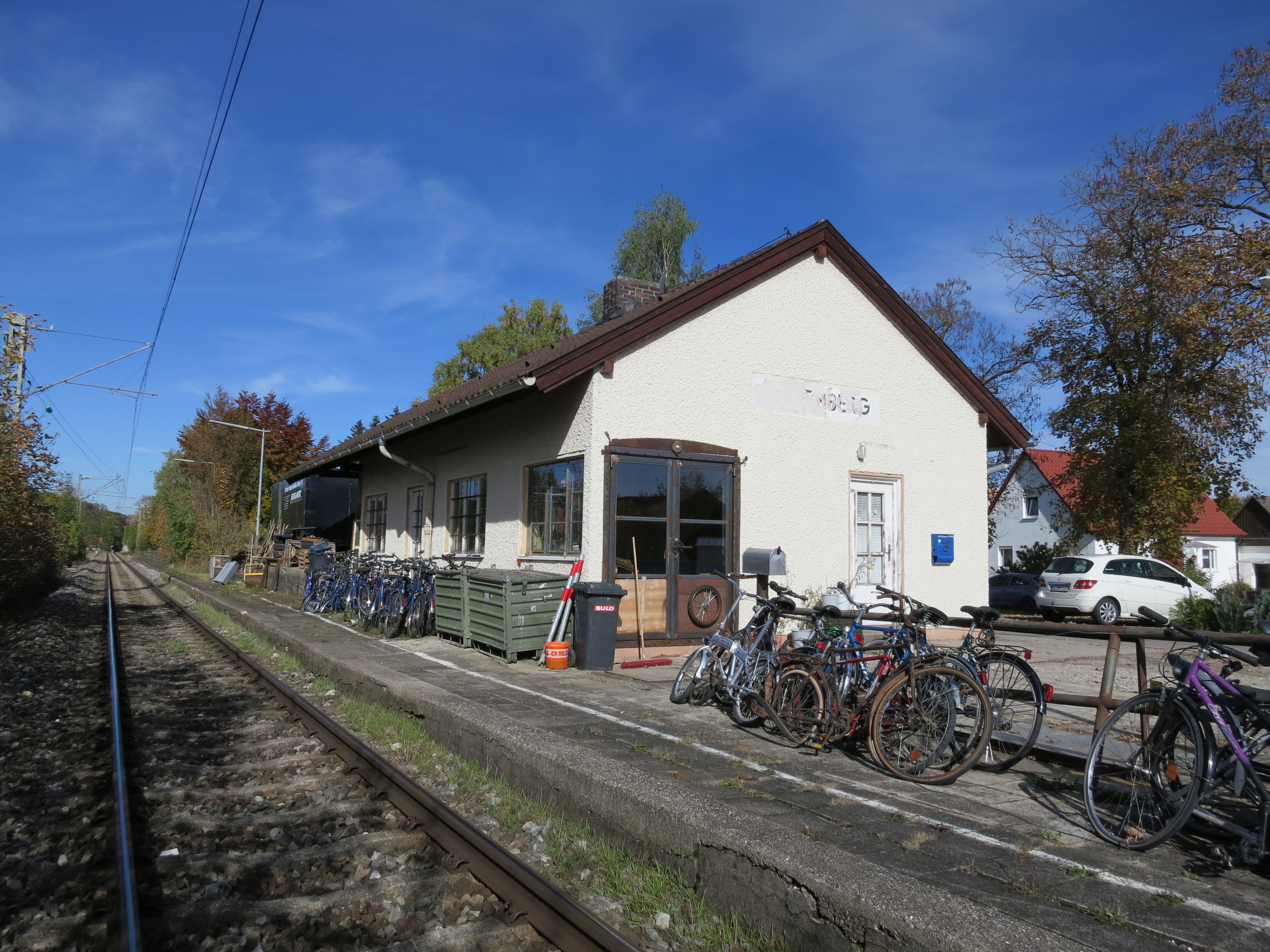 Empfangsgebäude von der Gleisseite und Hausbahnsteig des ehemaligen Bahnhofs Kaltenberg an der Ammerseebahn